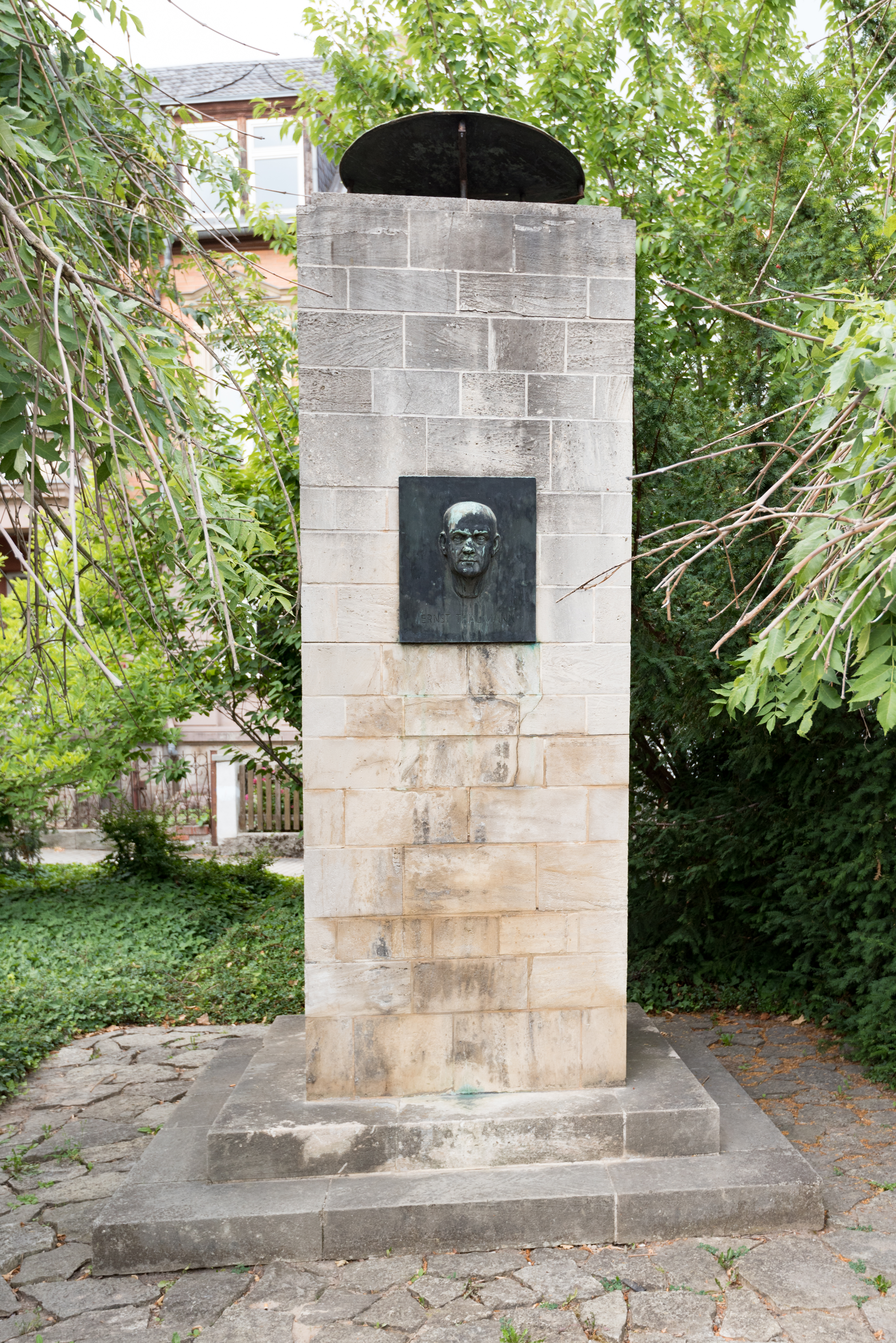 Naumburg (Saale), Am Salztor, Ehrenmal für 1920 Ermordete